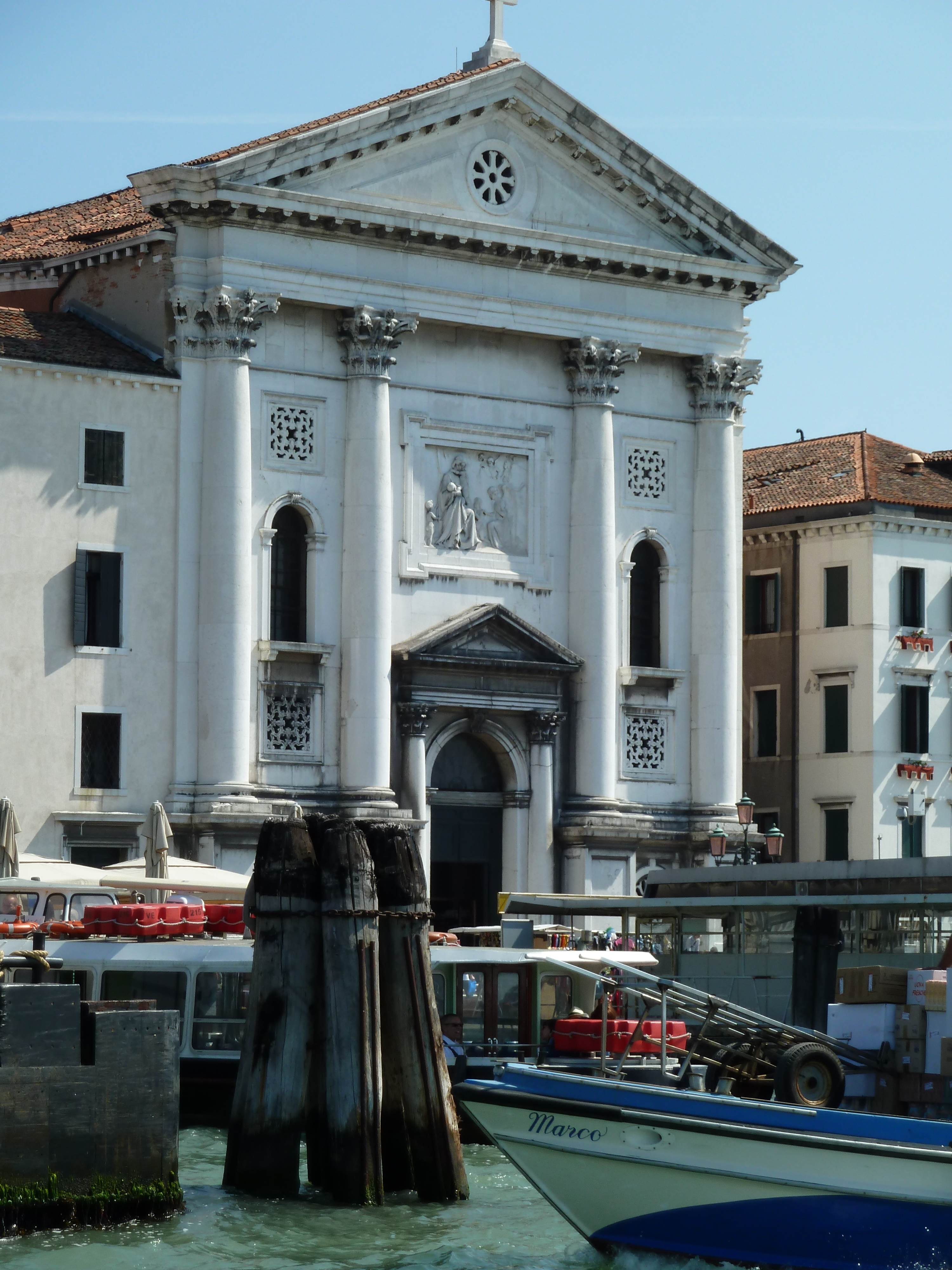 Chiesa della Pietà (Venice)